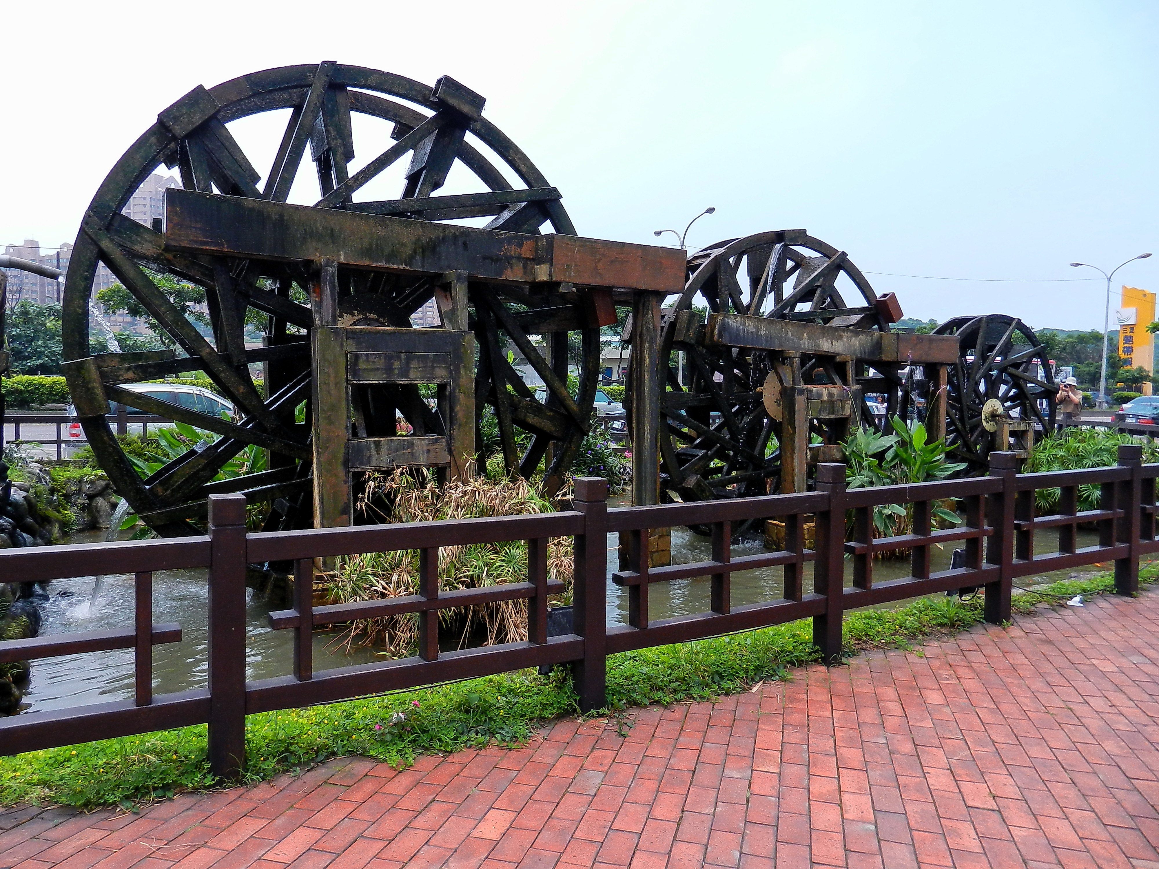 Gende Waterwheel Park 根德水車公園